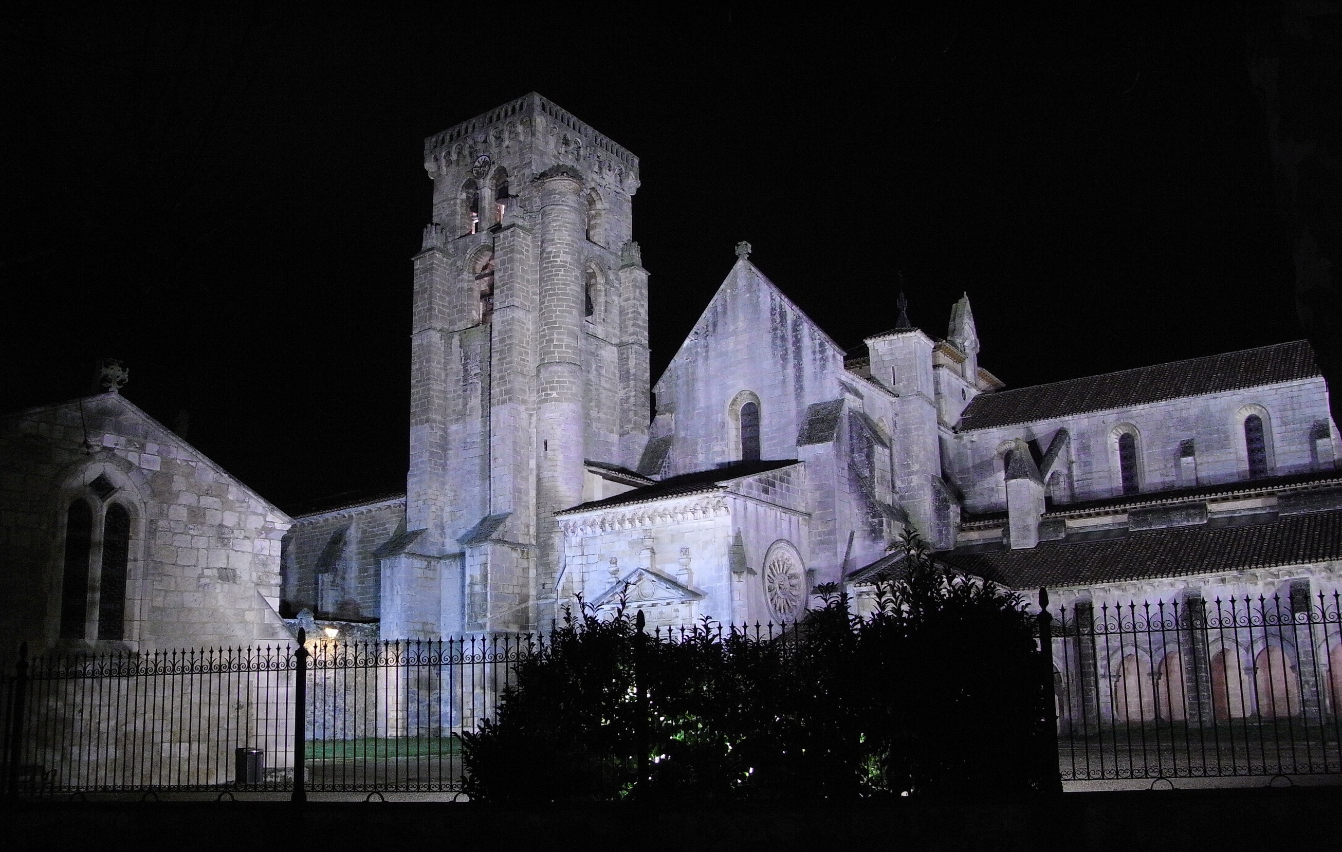 Monasterio de Santa María la Real de Las Huelgas de Burgos de noche